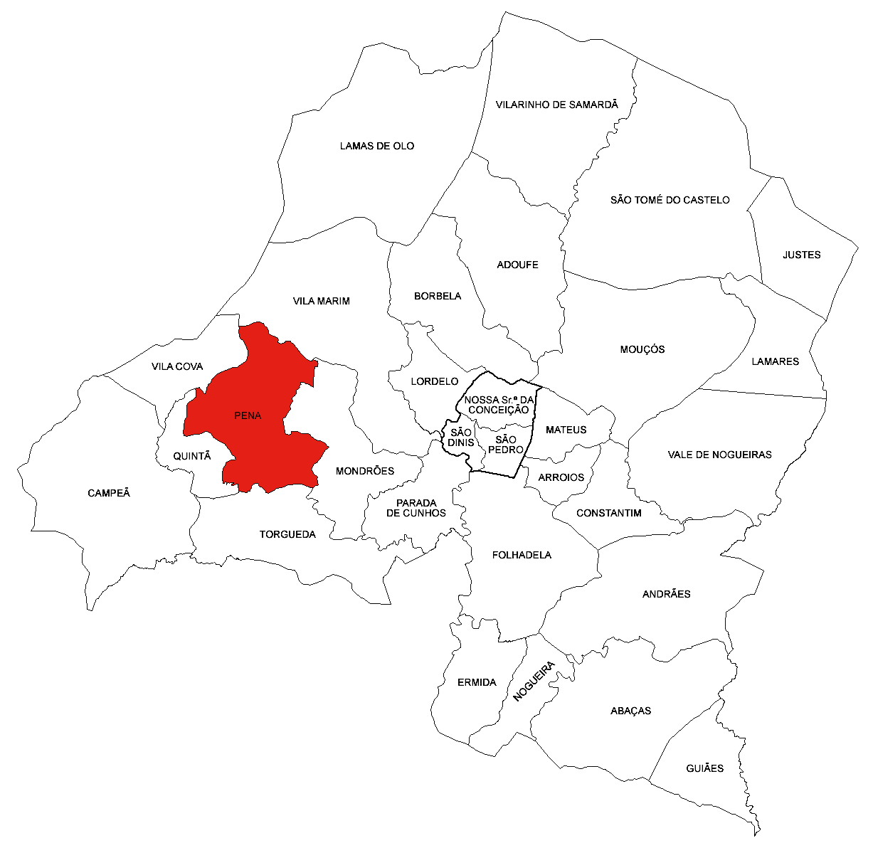 Freguesia da Pena (concelho de Vila Real)